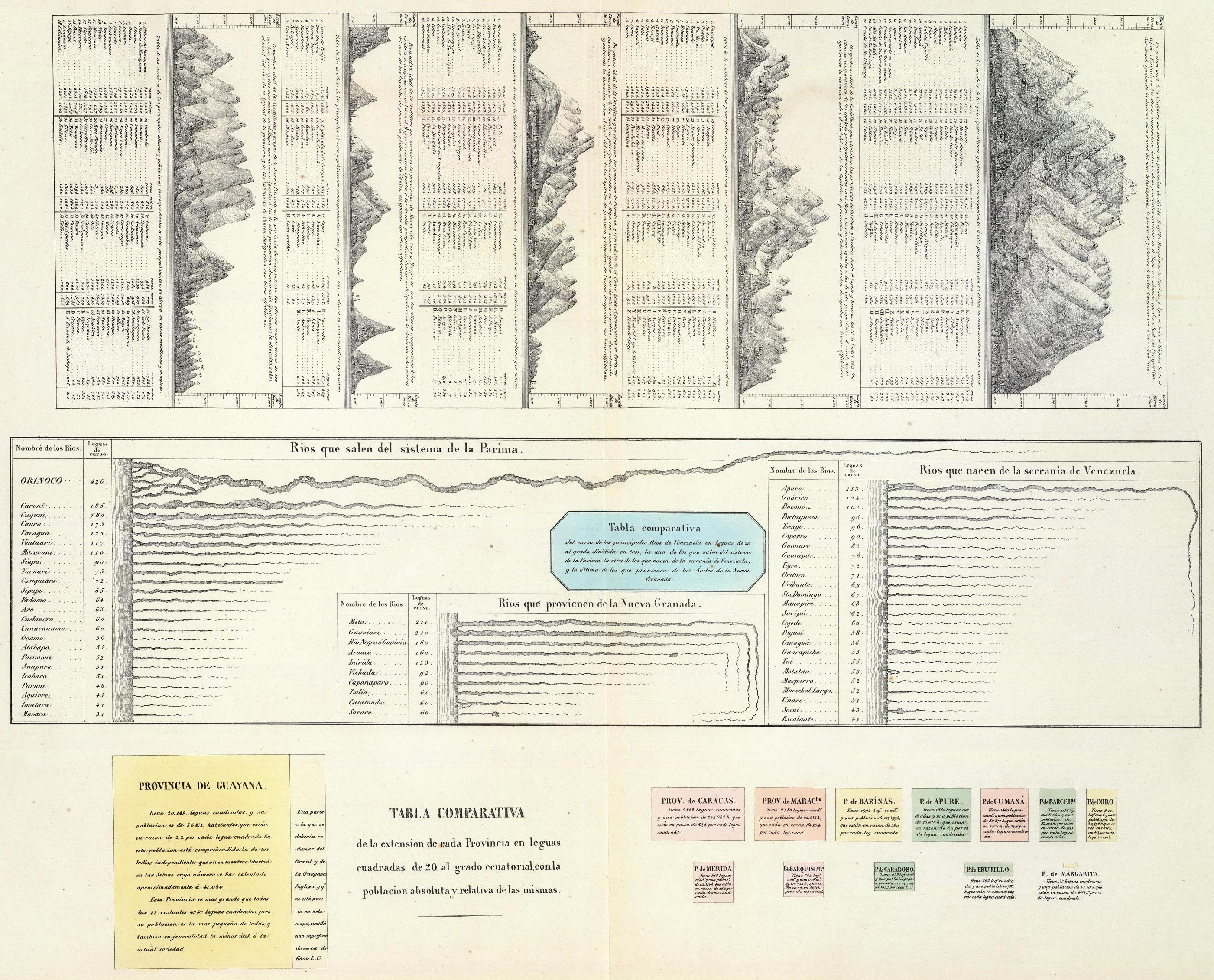 Orografía e hidrografía de Venezuela. Tomado del "Atlas físico y político de la República de Venezuela", 1840.